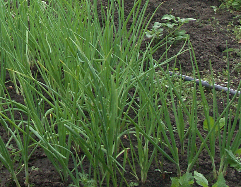 Лук зелёный на грядке Author: Алексей (User:Glaue2dk)